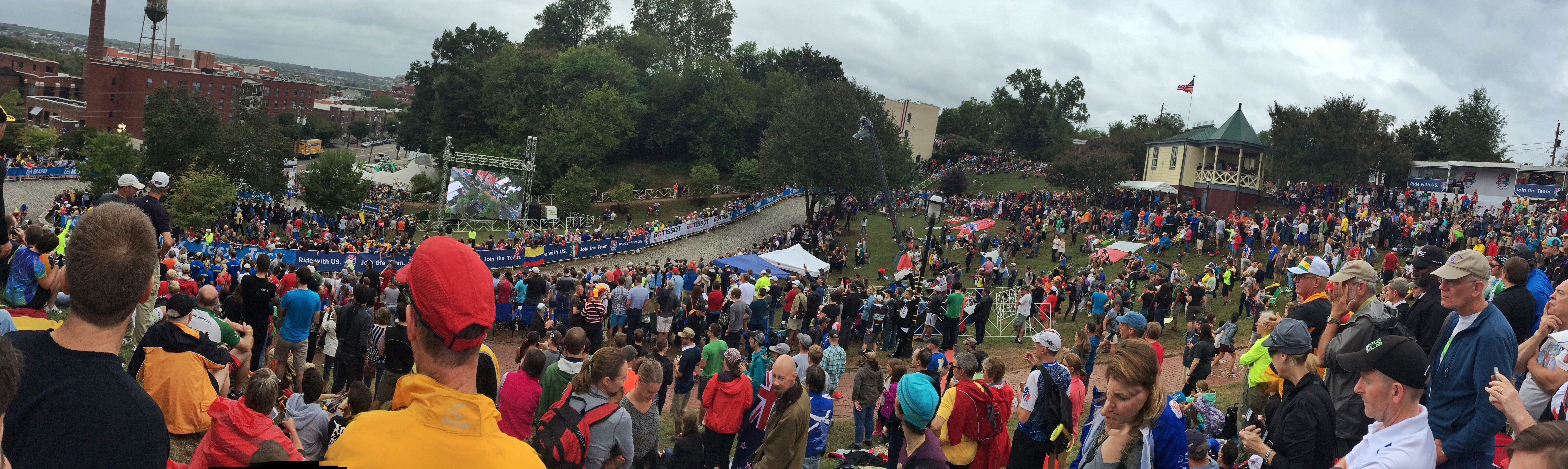 Libby Hill panorama. #uci2015rva